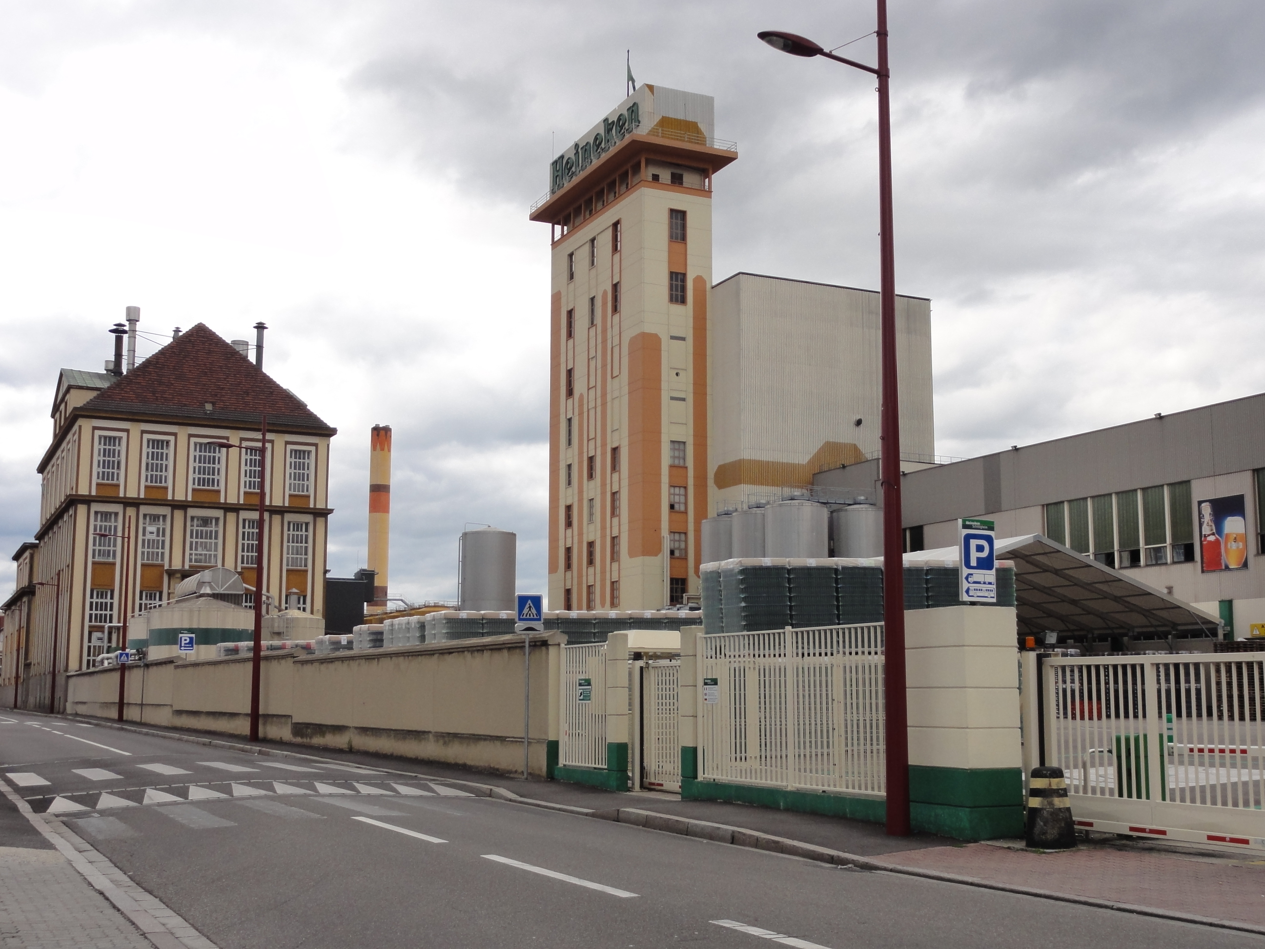 Alsace, Bas-Rhin, Schiltigheim, Brasserie Heineken, rue Saint-Charles.